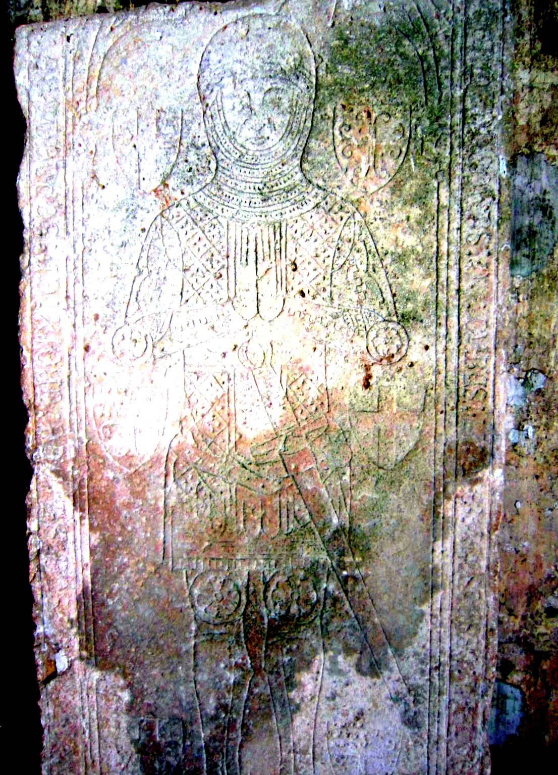 Pierre tombale de Guillaume de Fougerolles dans l'église de Bure-les-Templiers (Côte-d'Or)